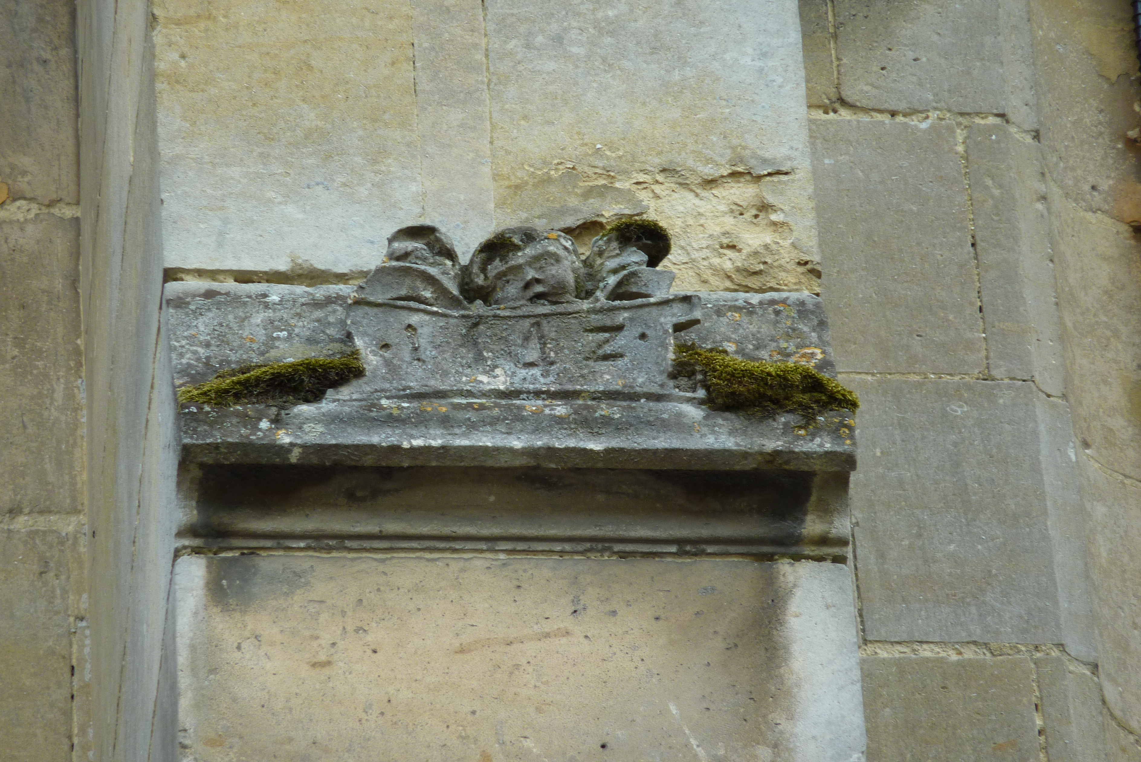 katholische Pfarrkirche Saint-Martin in Groslay